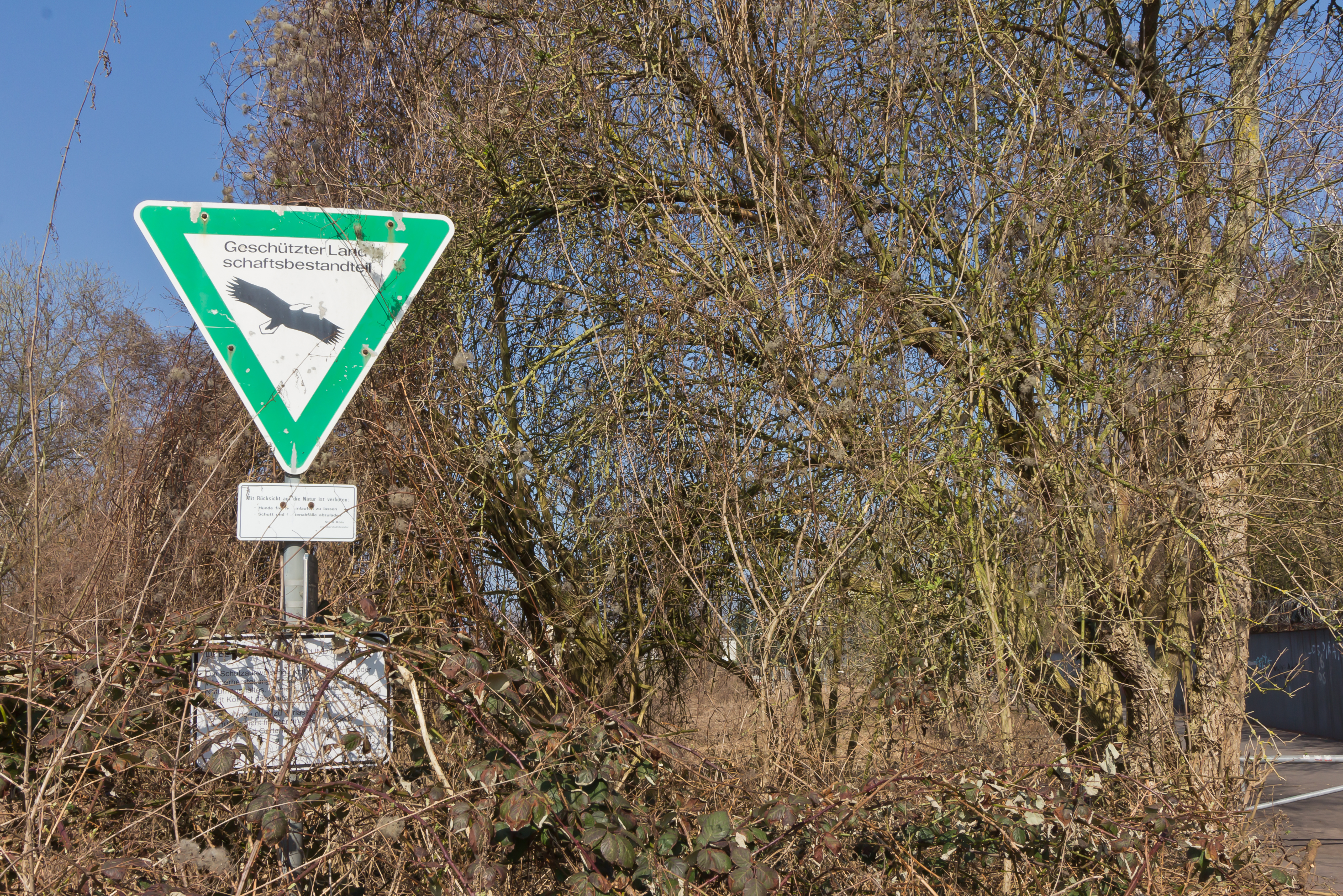 „Geschützter Landschaftsbestandteil“ in Köln-Braunsfeld